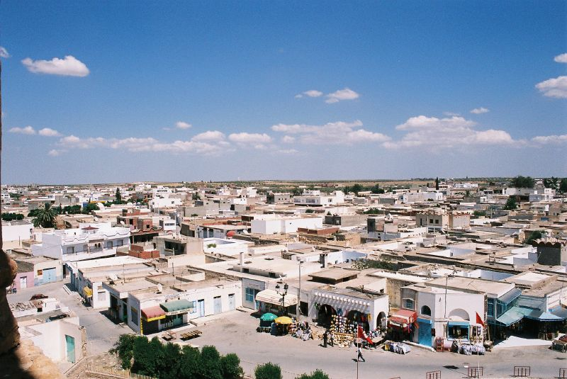 Vue d'El Jem (Tunisie) depuis l'amphithéâtre